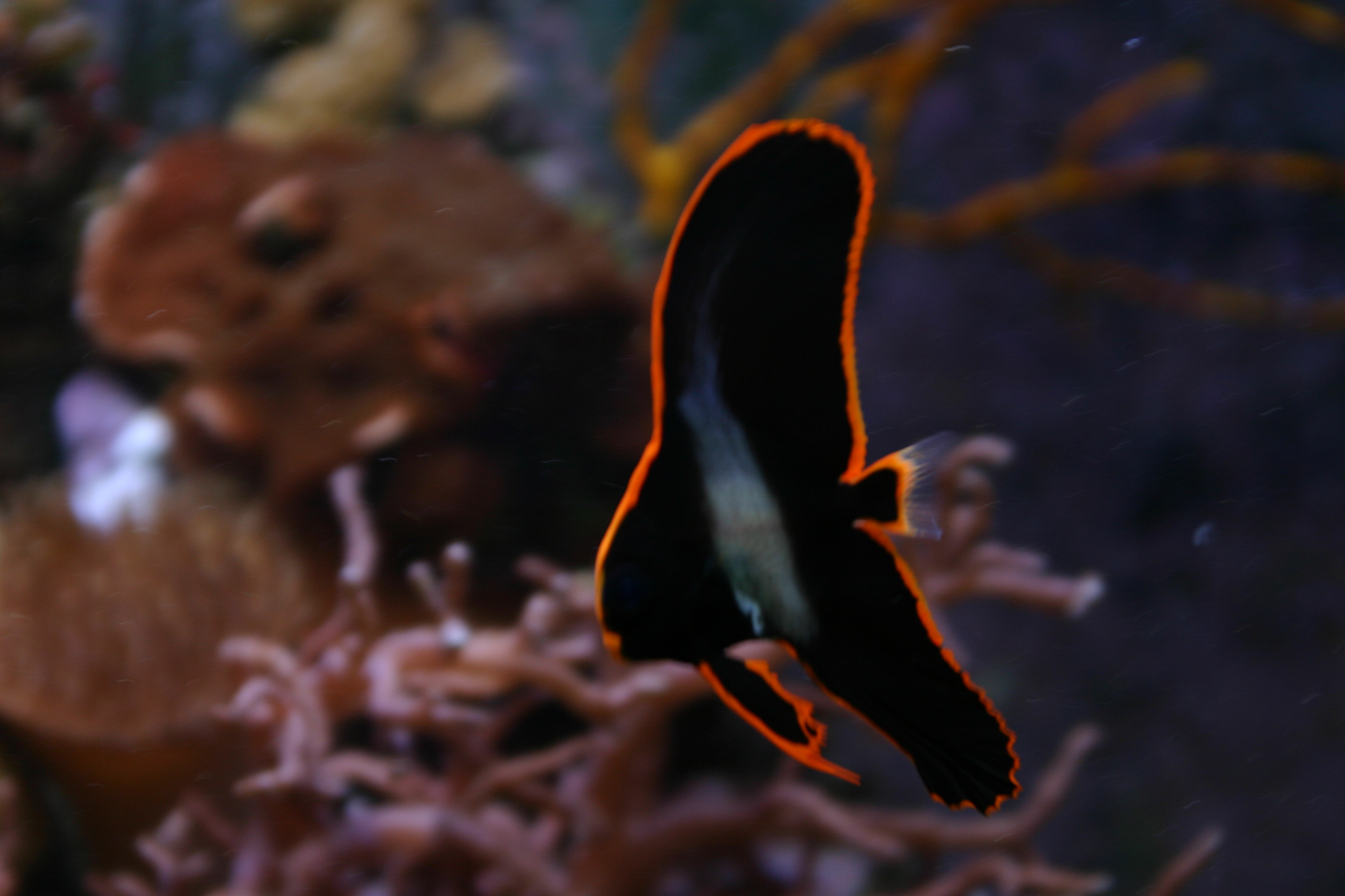 Platax pinnatus juvenil en acuario de arrecife